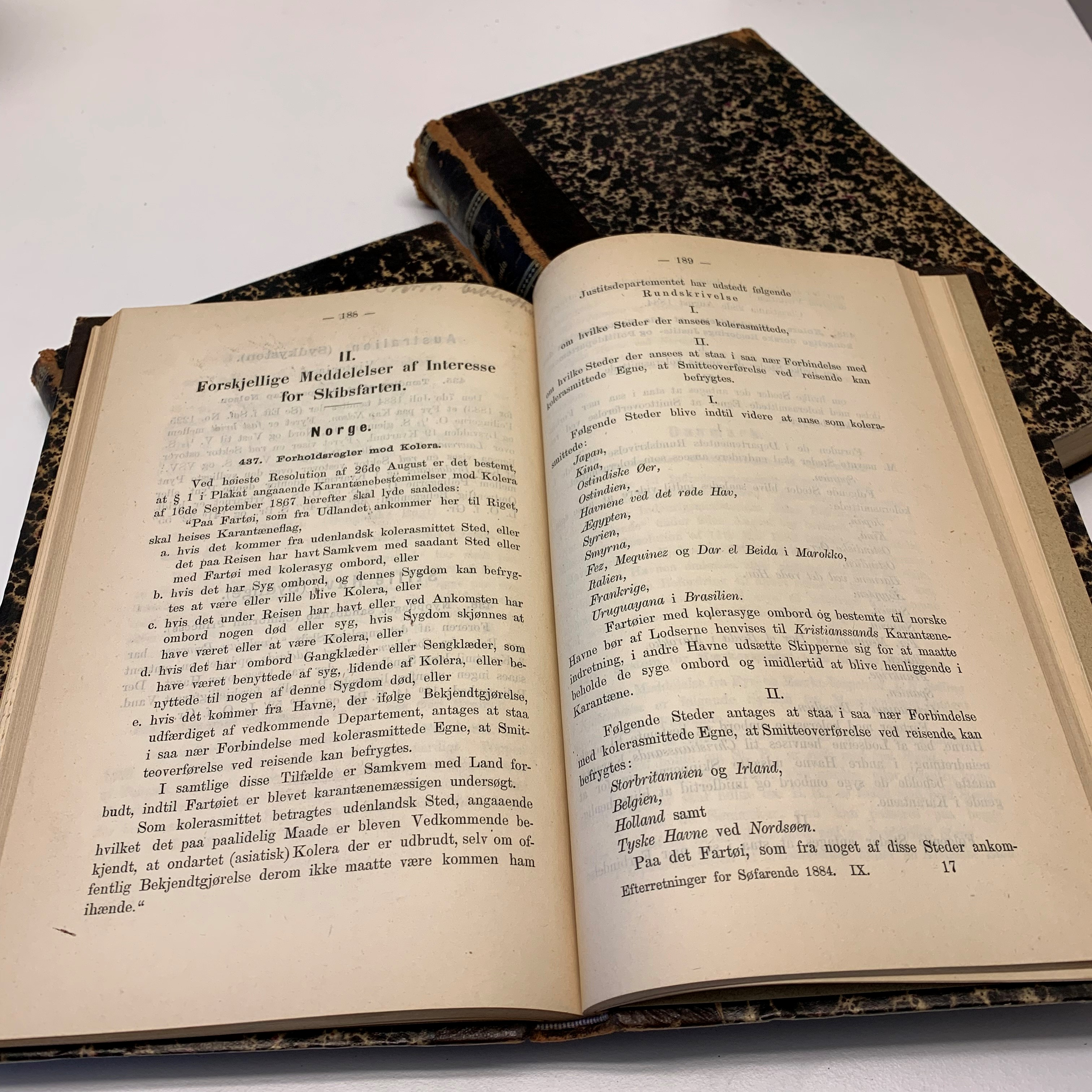 Illustrasjon fra innbundne EFS